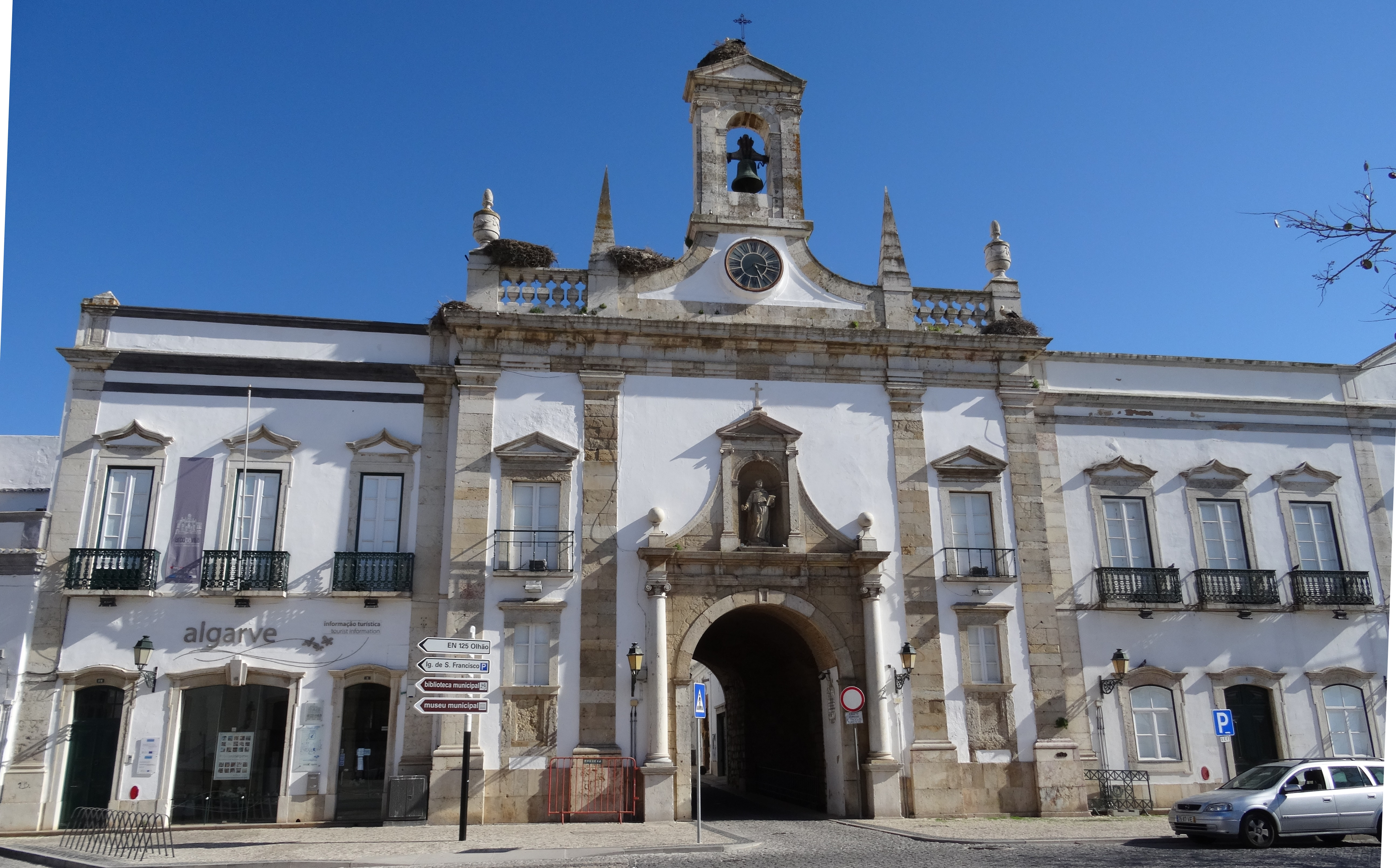 Arco da Vila, Faro, Portugal